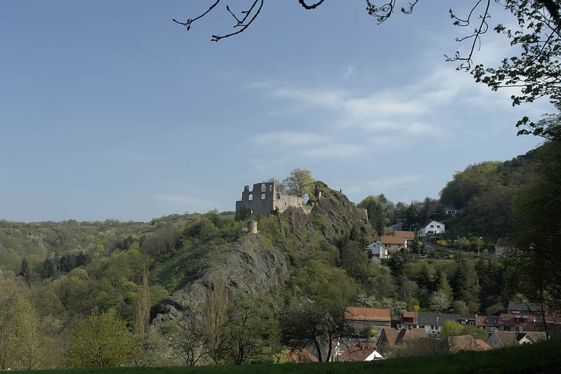 Die Burg und der Ort Falkenstein vom Friedhof aus gesehen